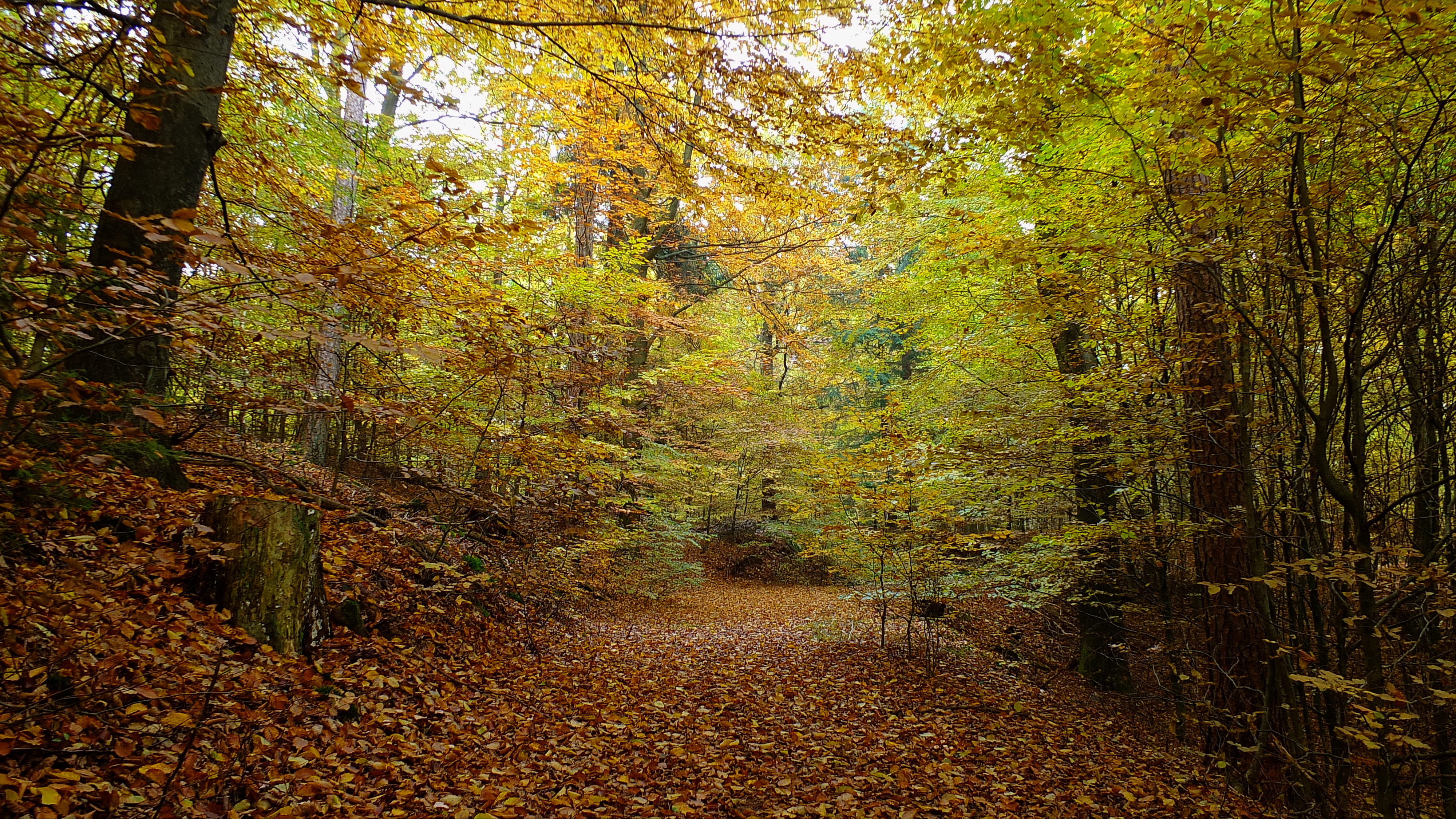 Garlstorfer Wald (Verwaltung: Klosterrevierförsterei Garlstorfer Wald) im Landschaftsschutzgebiet LSG WL 00017: "Garlstorfer Wald und weitere Umgebung" / im FFH-Gebiet 2726-331: "Garlstorfer und Toppenstedter Wald" (Niedersachsen, Landkreis Harburg): Weg zum Fastweg aus Richtung Westen, südlich vom Gipfel des Ahrbergs